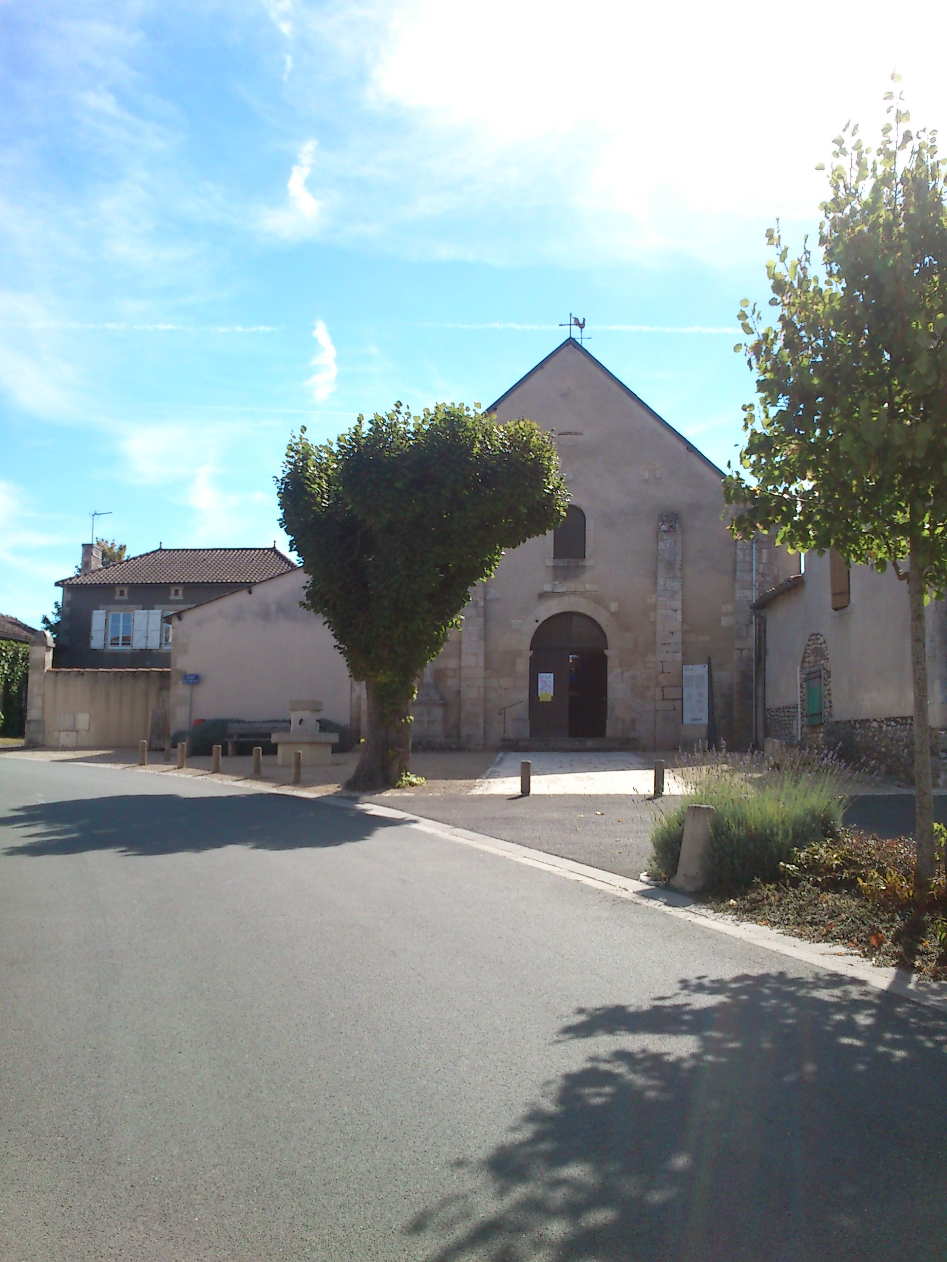 Église Saint-Hilaire de Leignes-sur-Fontaine, (Classé, 1957) .